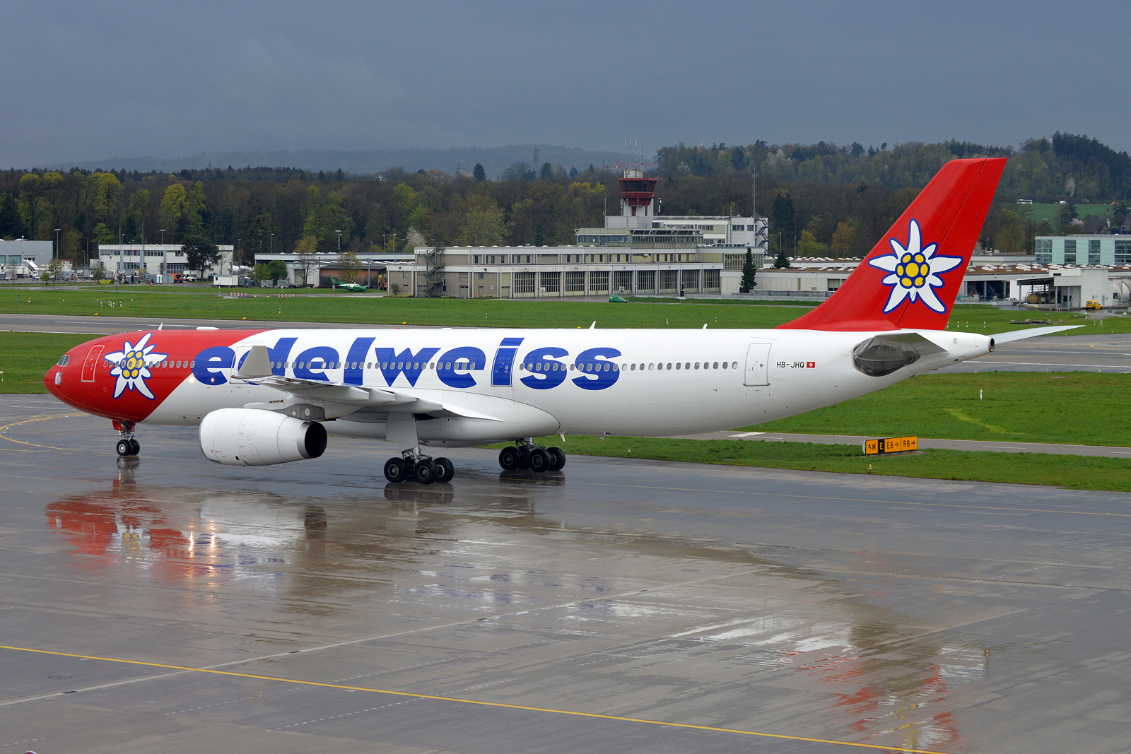 Zürich (- Kloten) (ZRH / LSZH) Switzerland 4.2016